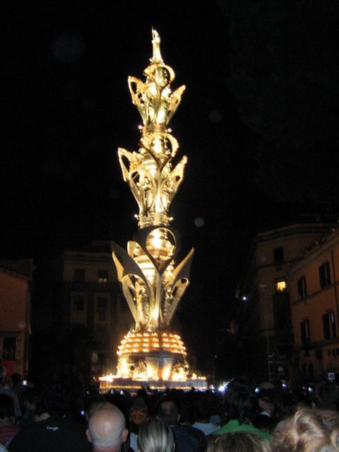 Macchina di Santa Rosa di notte, durante il trasporto